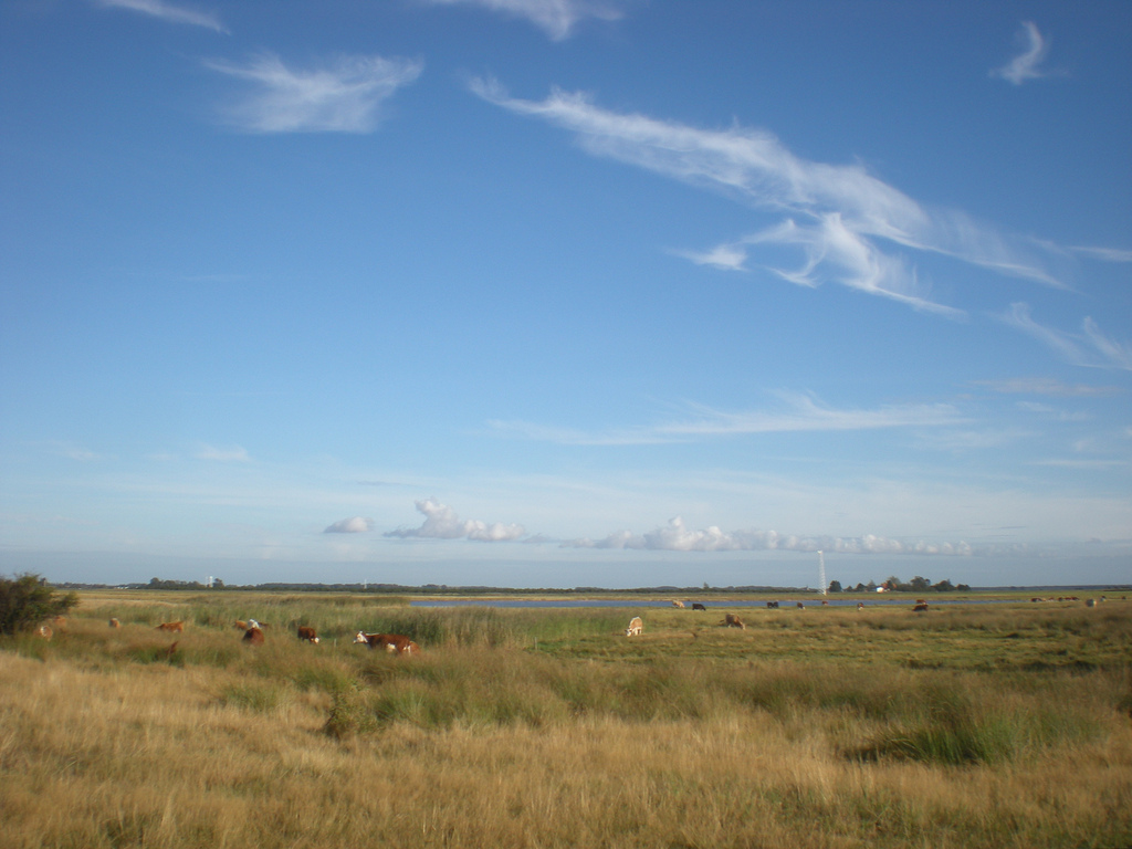 Fährinsel